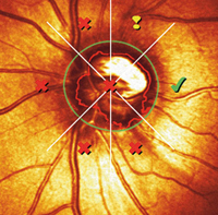 MRA-Klassifikation an einem glaukomatösen Sehnervenkopf